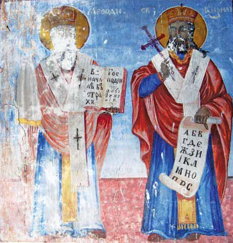 Рамна, црква Св. Ѓорѓи, св. Кирил и св. Методија, северен ѕид